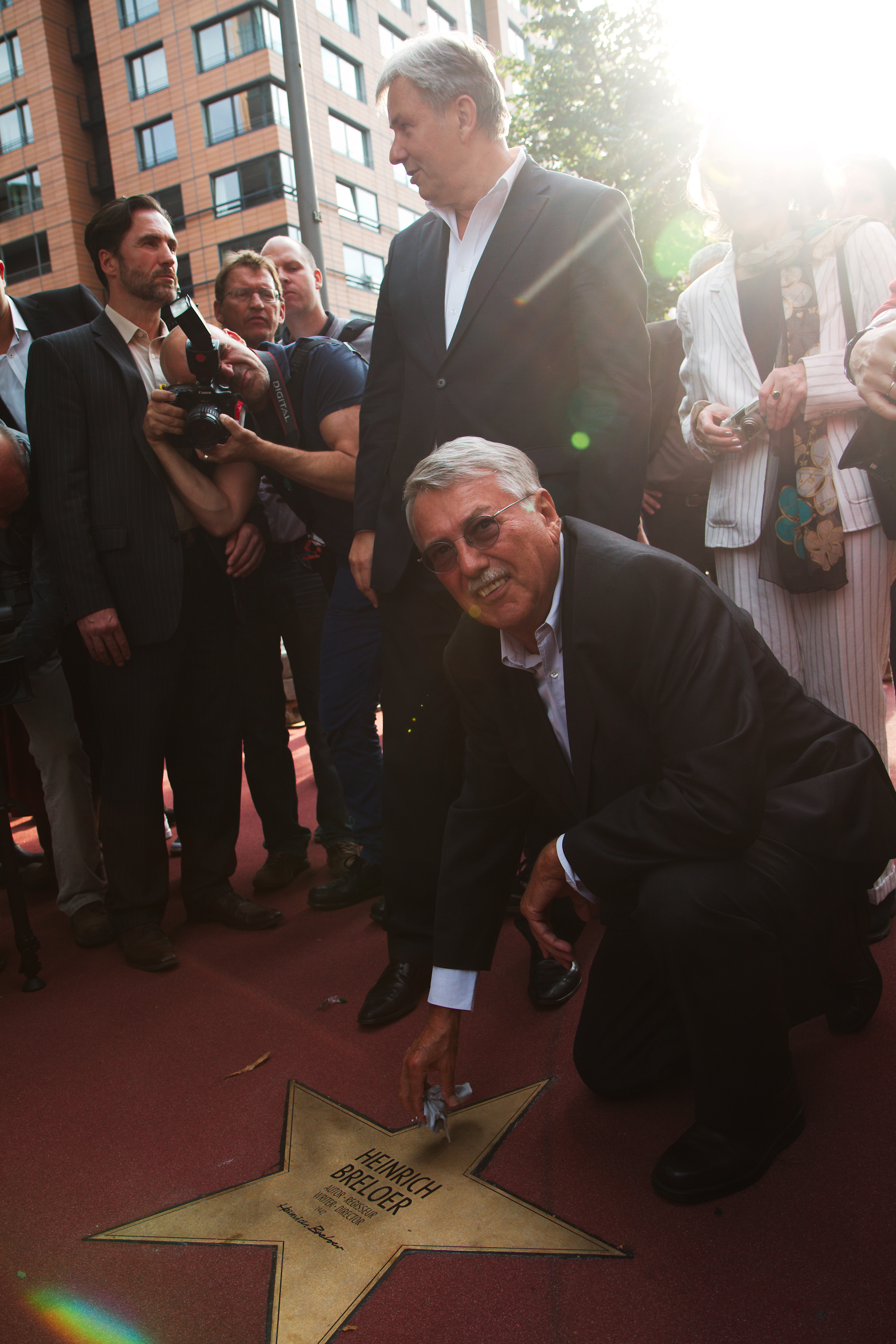 Putzt den Stern.